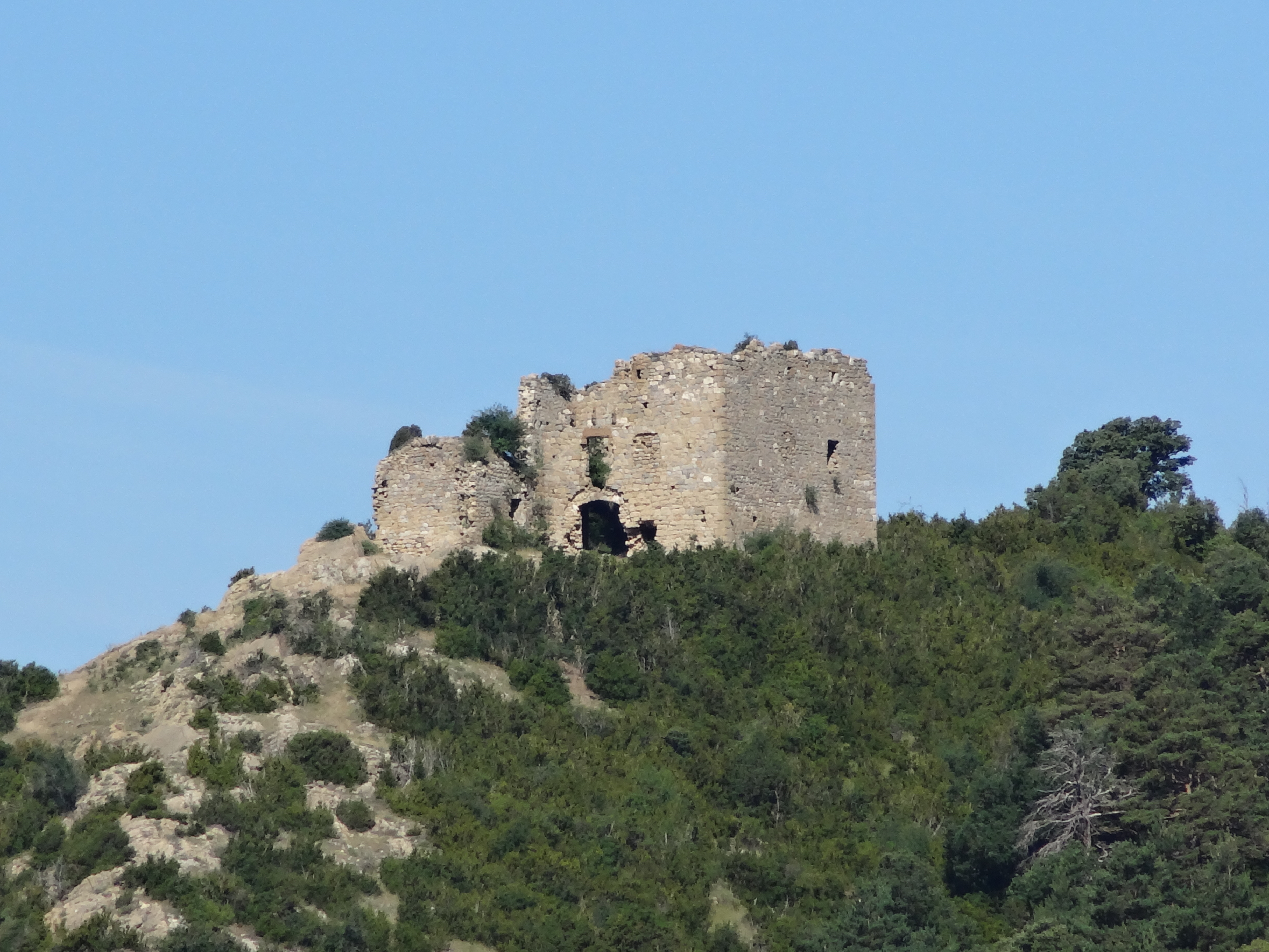 Castell d'Odèn